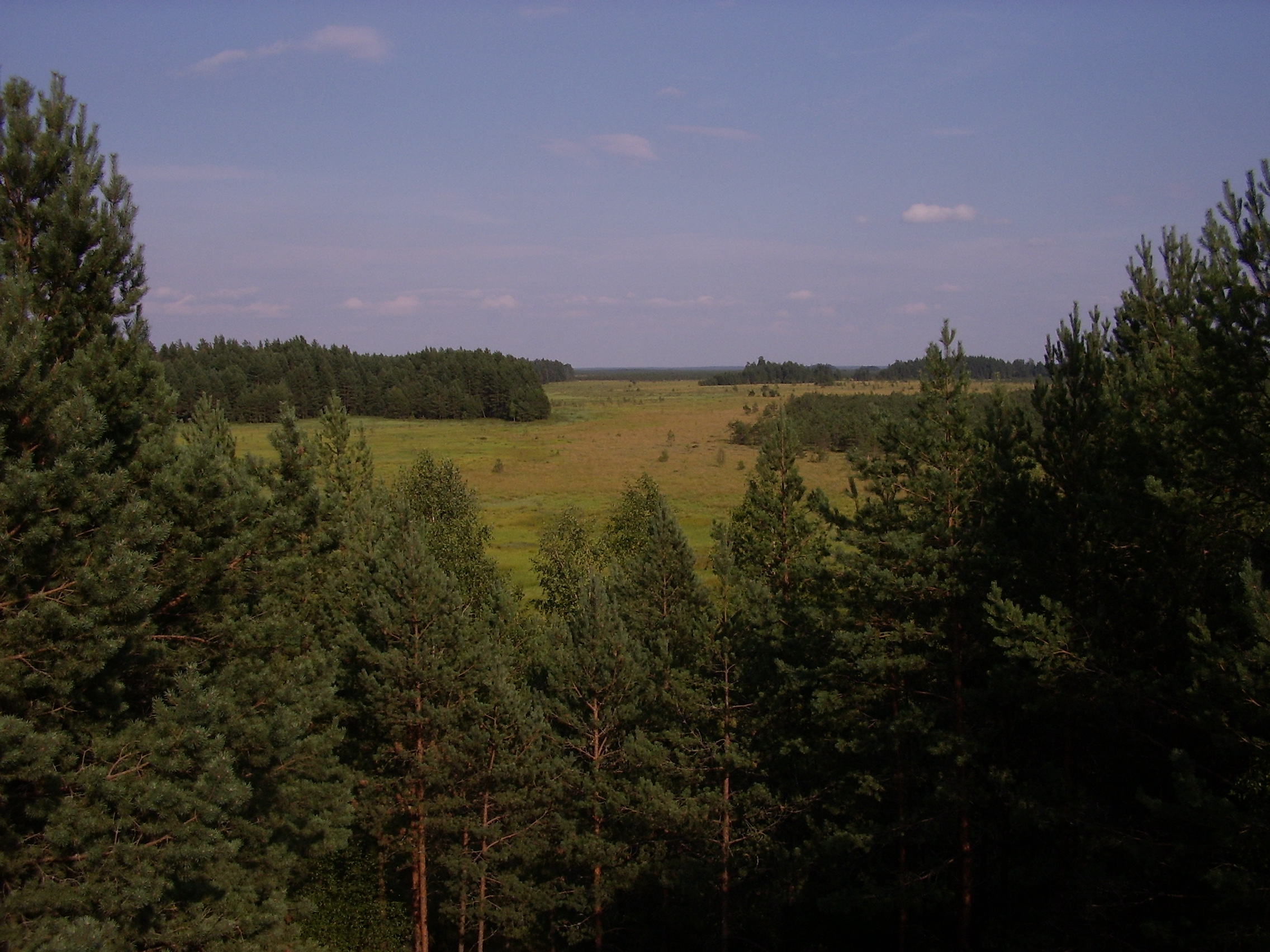 Čepkelių rezervatas. Autorius: Mykolas Zovė